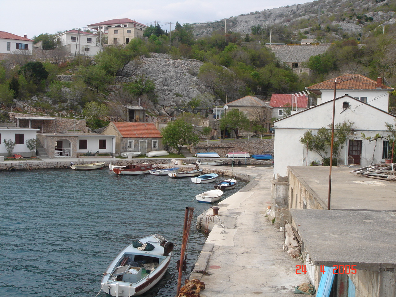 Barić Draga - Pogled na staru dragu